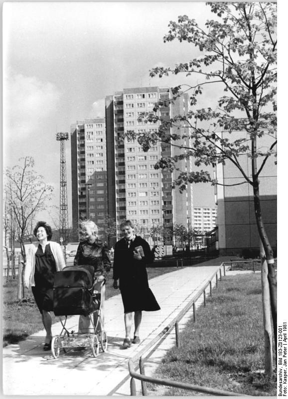 ADN-ZB-Kasper-23.4.1981-Erfurt: Im Wohngebiet Roter Berg, dem dritten Erfurter Neubaugebiet, istder Wohnungsbau abgeschlossen. Die Bilanz der Bauschaffenden sind 5 402 Neubauwohnungen, vier Schulen, zwei Turnhallen, eine Kaufhalle und vier Kinderkombinationen. Ein Altersheim steht kurz vor seiner Fertigstellung. Bis 1985 sollen hier u.a. noch eine Apotheke und eine Ambulanz mit neun Arztstellen errichtet werden.